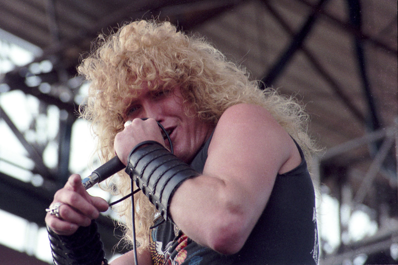 Rhett Forrester au Breaking Sound Festival du Bourget, 29-30 août 1984.